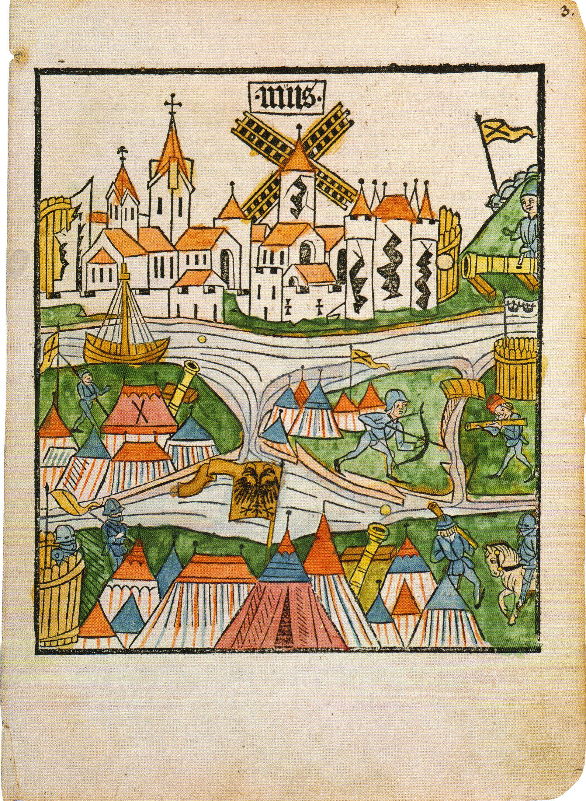 Belagerung von Neuss, Holzschnitt aus Conradus Pfettisheim: Geschichte Peter Hagenbachs [Straßburg] 1477